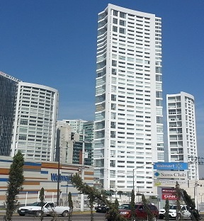 Clima Zac 3 dic 2013 - Puerta de Hierro